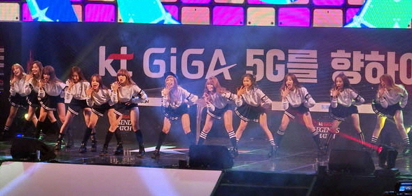 KT 주최 '기가 레전드 매치' e스포츠 이벤트